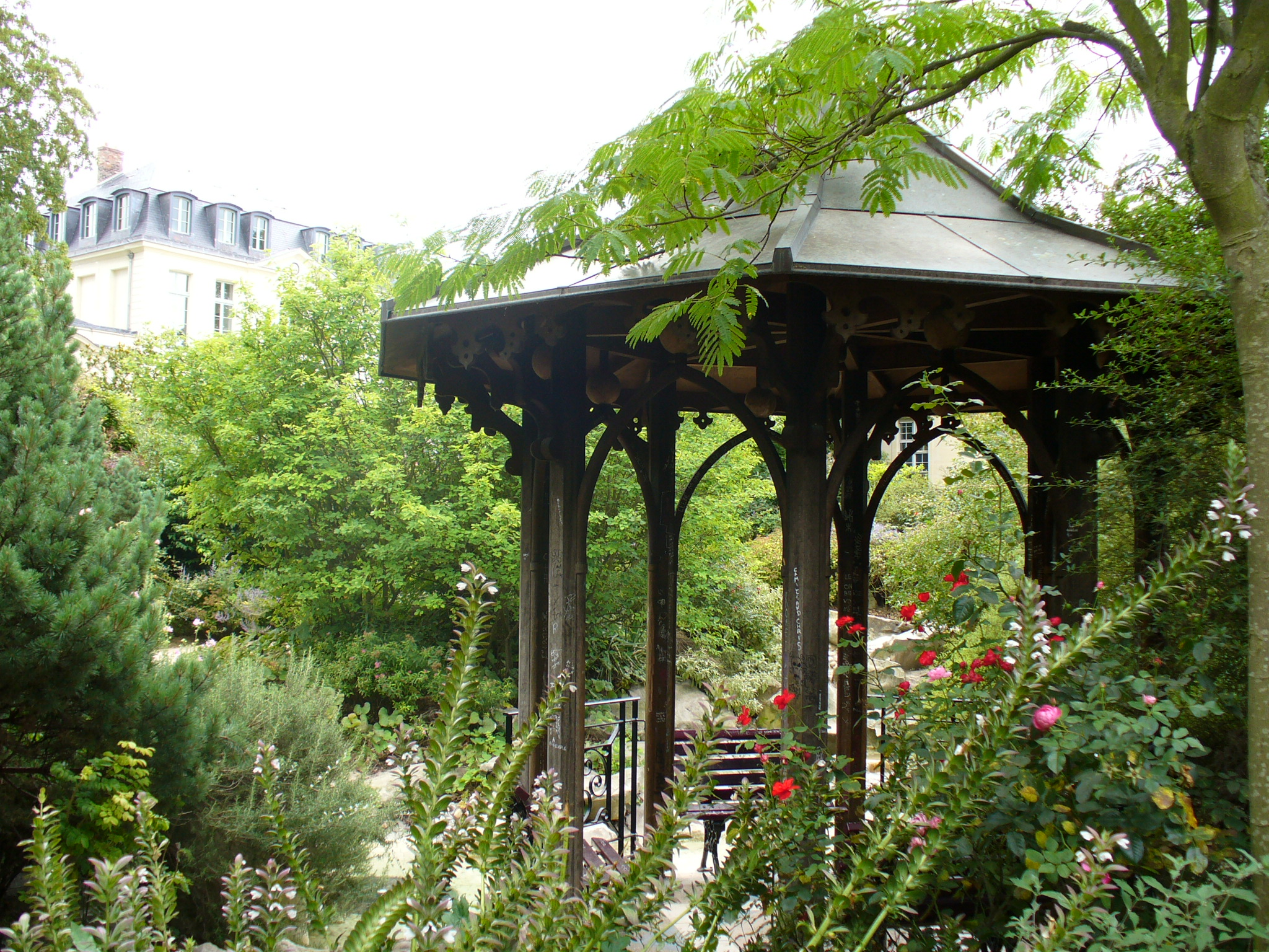 Parc des Sarmants à Châtillon (92) (jardin municipal)